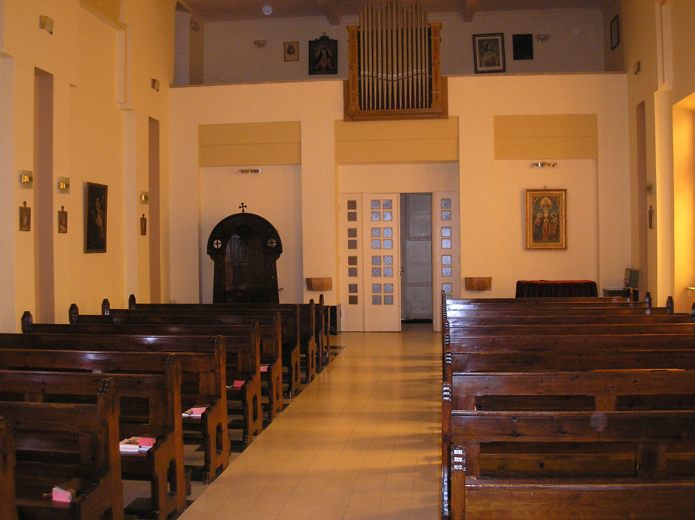 Terra Sancta, Jerusalem